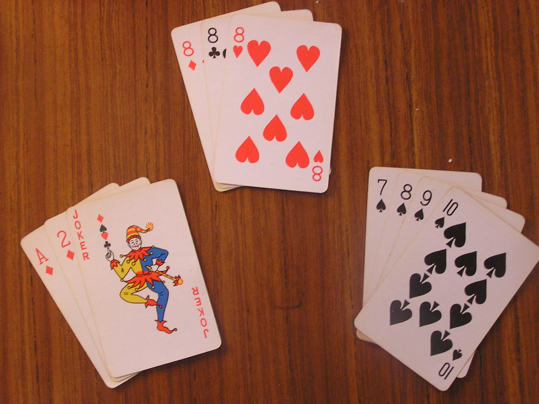 Rummy (game)-card configuration.ext